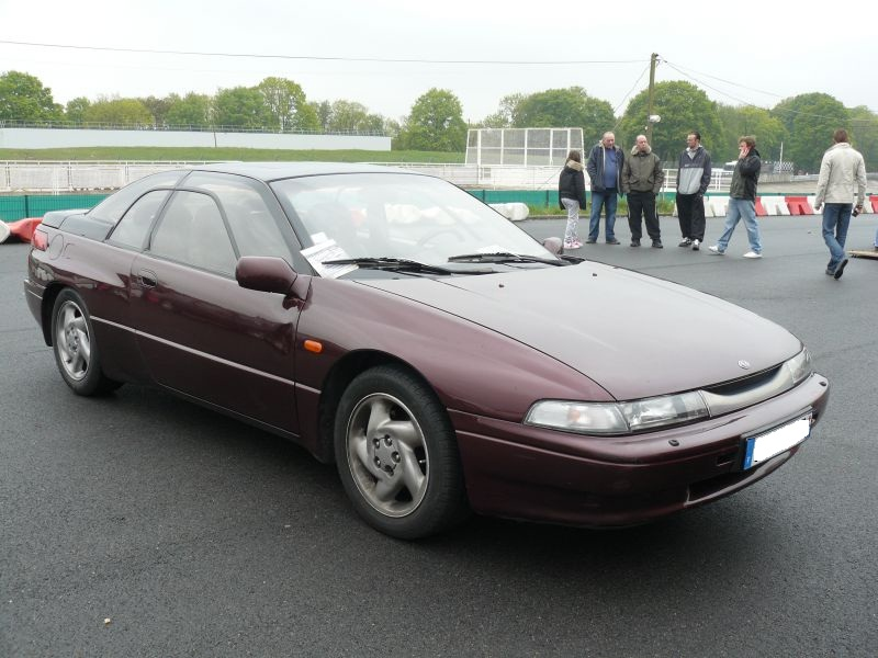 Français cadien: Montlhery Avril 2012